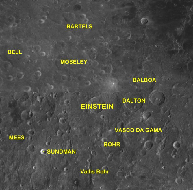 Cráter lunar Einstein. Localización (Imagen LRO)